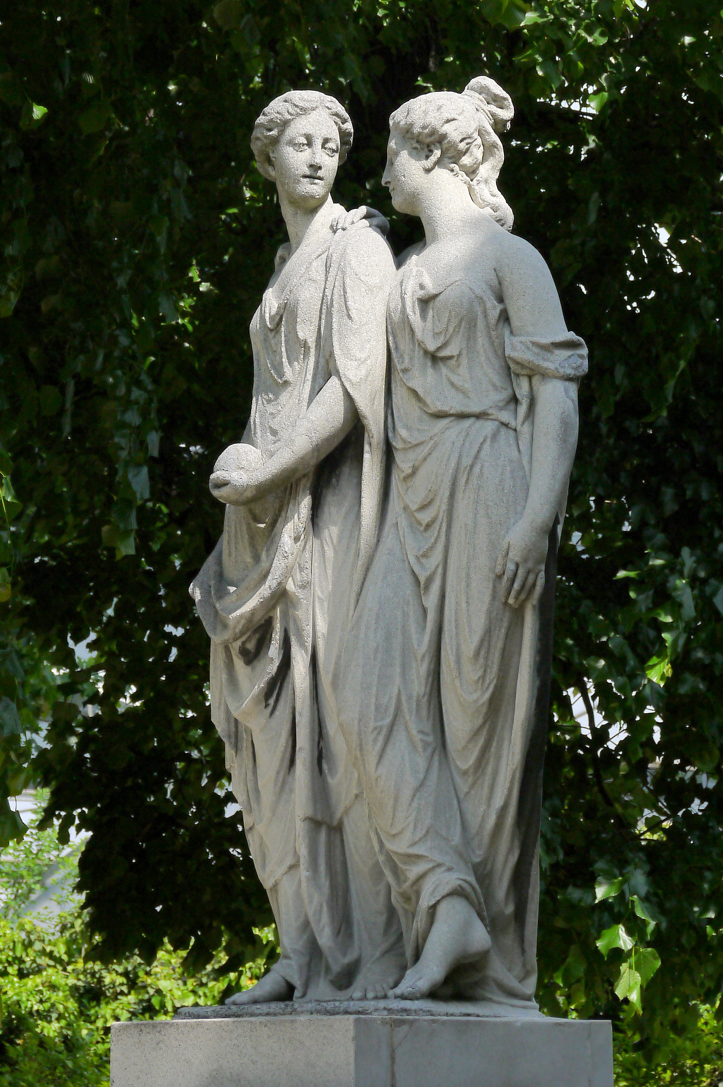 Hesperiden